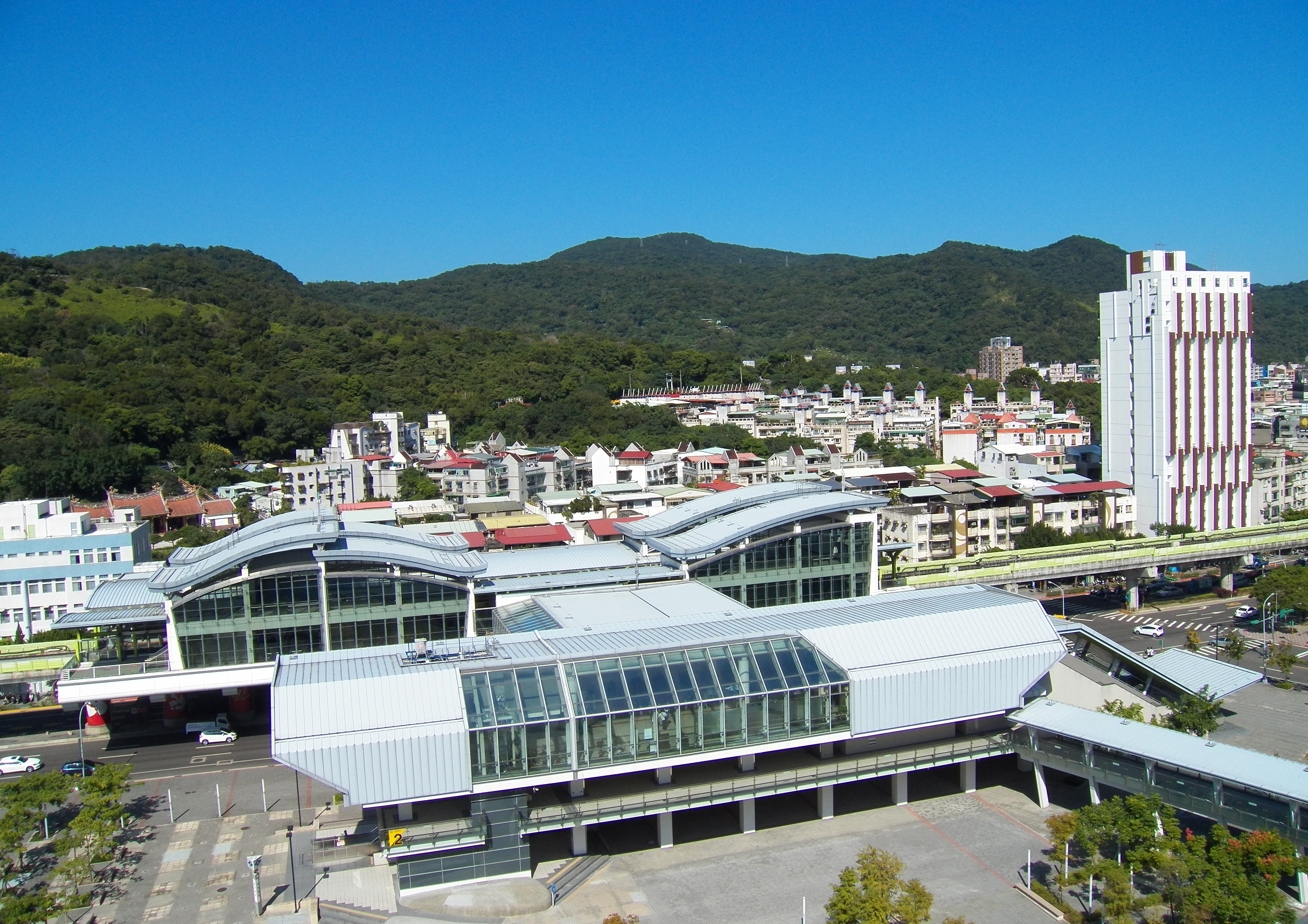 由典華飯店旗艦館屋頂俯瞰臺北捷運劍南路站。